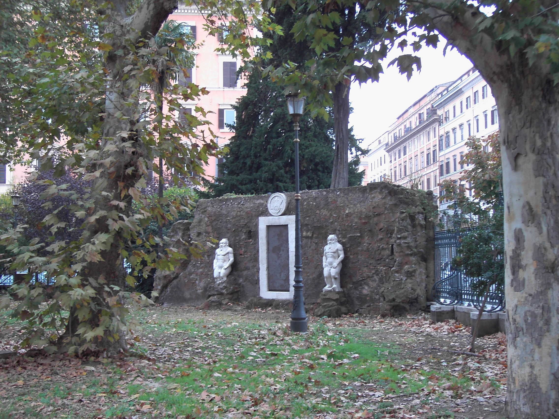 Roma, Piazza Vittorio: la Porta magica del marchese di Palombara by Lalupa